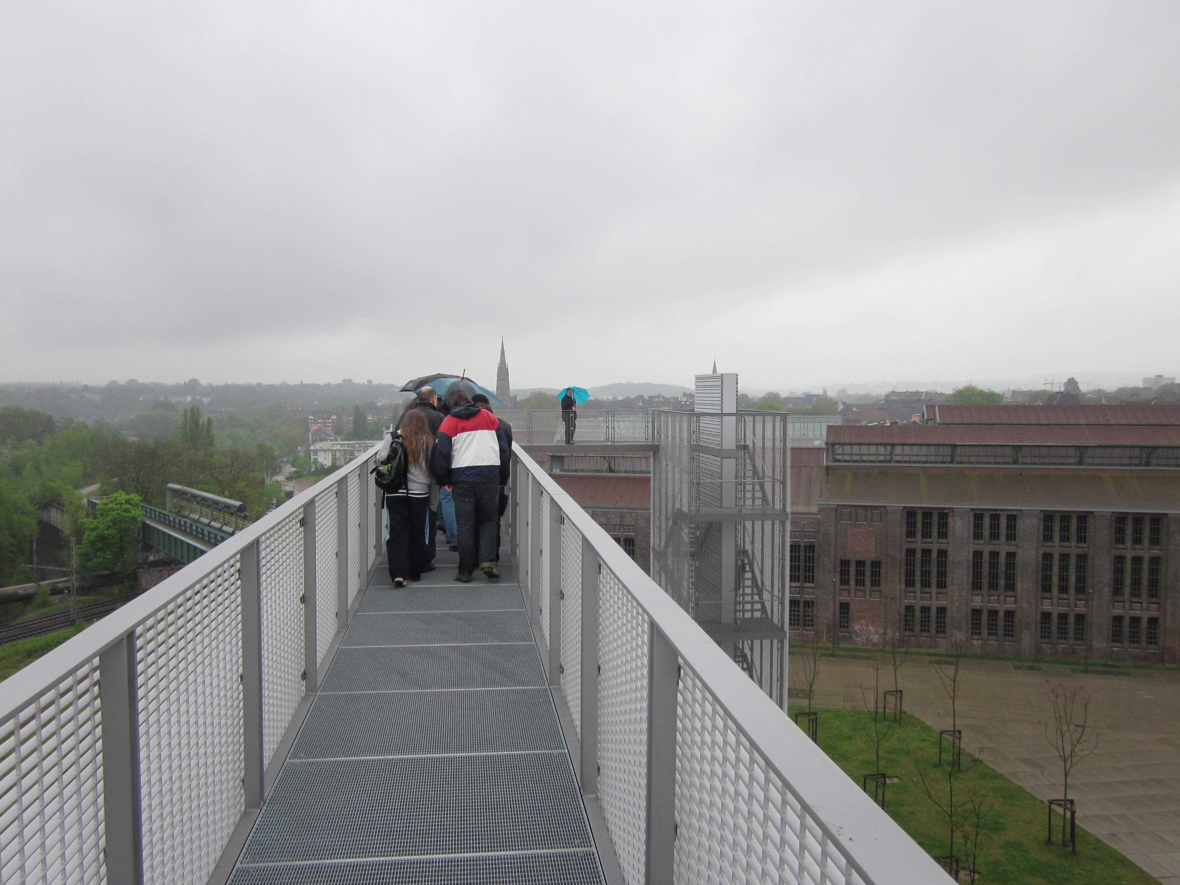 Hörder Skywalk auf Phoenix West